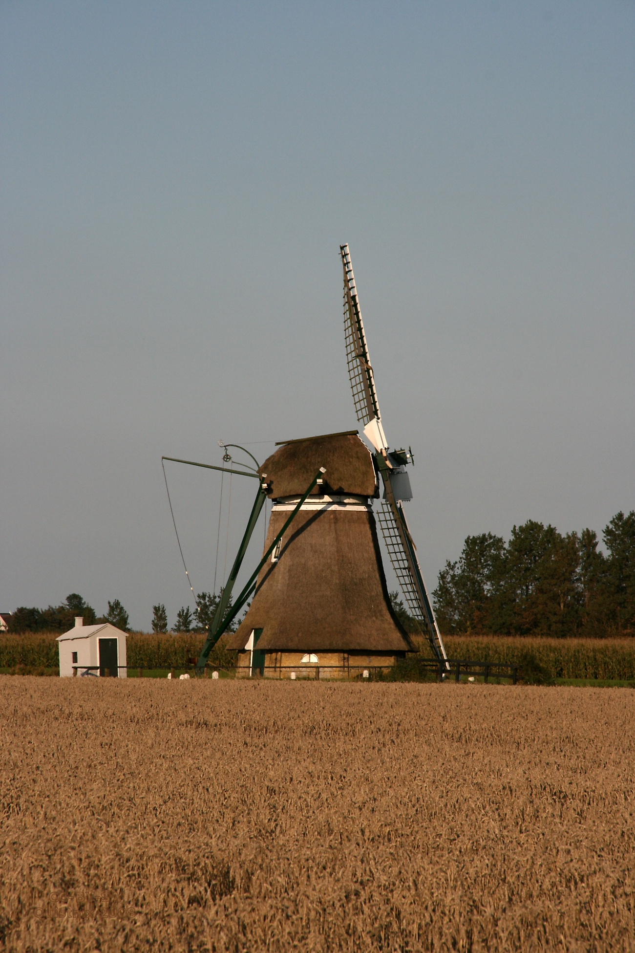 Kimswerd: De Eendrachtsmolen